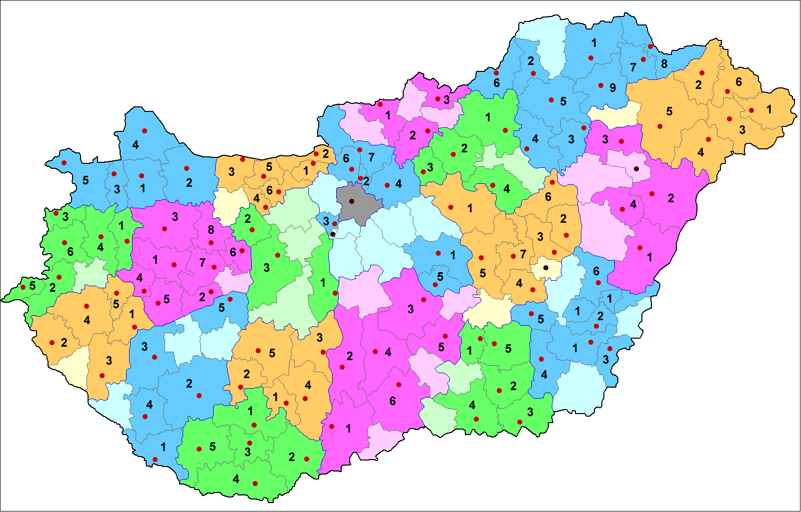 Városkörnyékek Magyarországon 1984 elején, a járások megszűnése után